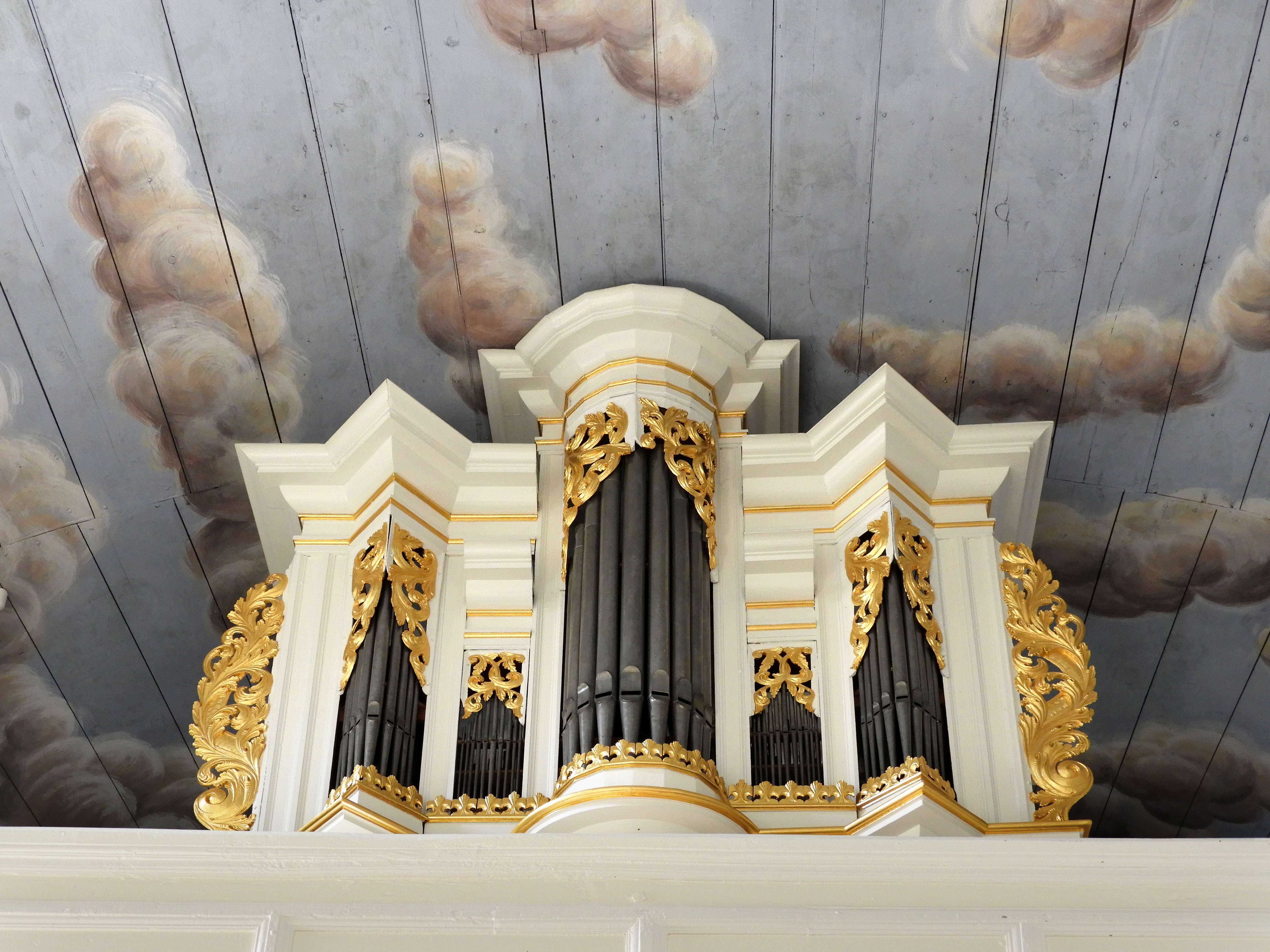 Die Dauphin-Orgel. Johann Eberhardt Dauphin (* um 1670; † 1731 in Hoheneiche) war der Spross einer hugenottischen Familie aus Dörna bei Mühlhausen in Thüringen. Das Orgelbauerhandwerk erlernte er bei dem renommierten Mühlhäuser Meister Johann Friedrich Wender, der eng mit Johann Sebastian Bach zusammenarbeitete. Unmittelbar nach Fertigstellung der Orgel ist Johann Eberhardt Dauphin verstorben. Gemeinsam mit seiner Frau Anna Regina wurde er im April 1731 auf dem damaligen Friedhof neben der Kirche begraben. Hoheneiche ist ein Ortsteil der Gemeinde Wehretal im nordhessischen Werra-Meißner-Kreis.